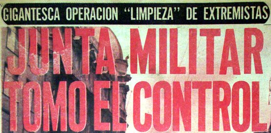 "Gigantesca operación limpieza de extremistas. JUNTA MILITAR TOMO EL CONTROL." Portada del diario 3era de la Hora luego del Golpe de estado en Chile del 11 de septiembre de 1973.